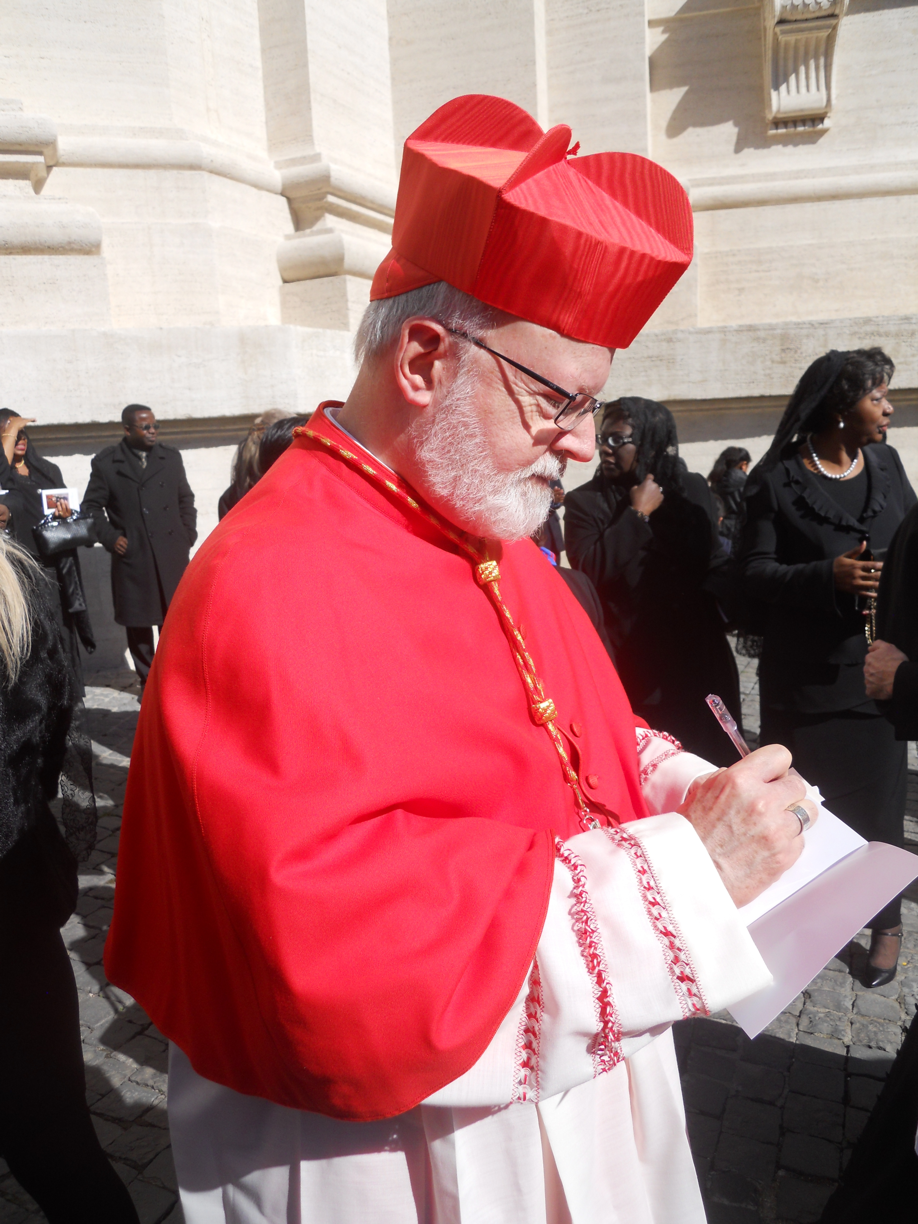 Sean Patrick Cardinal O'Malley